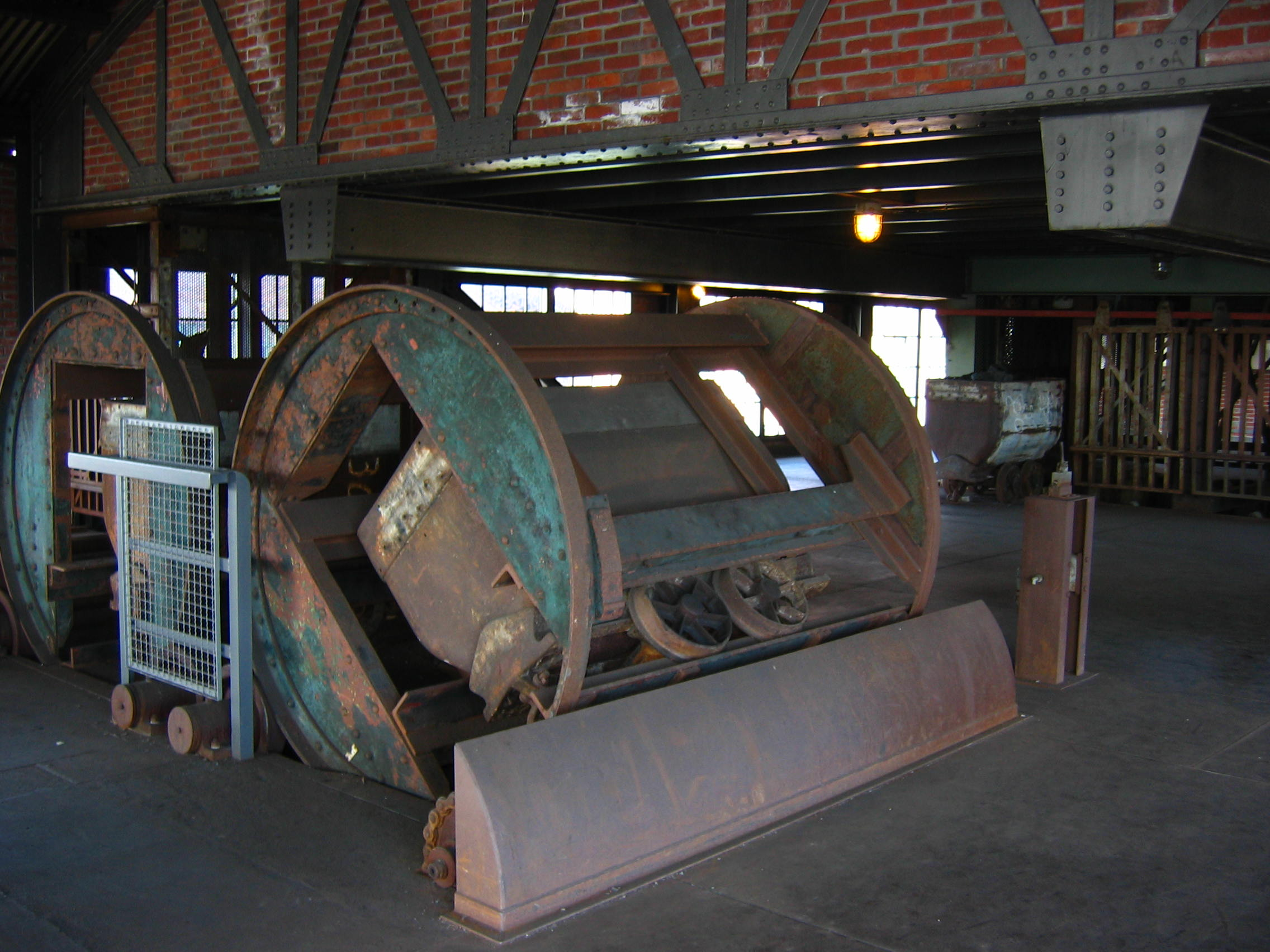 Zeche Zollern 2/4, Dortmund, Kreiselwipper